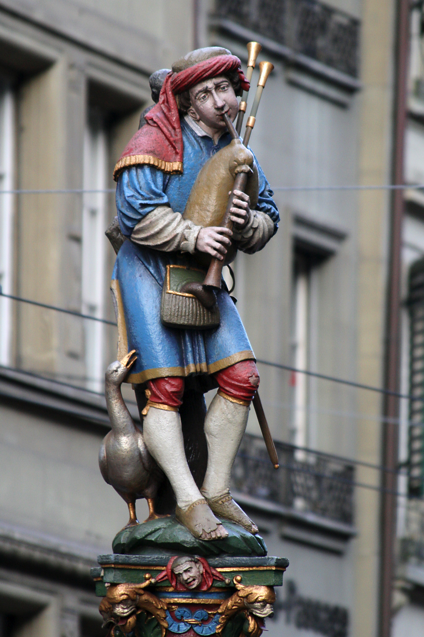 Pfeiferbrunnen, Berne, Switzerland